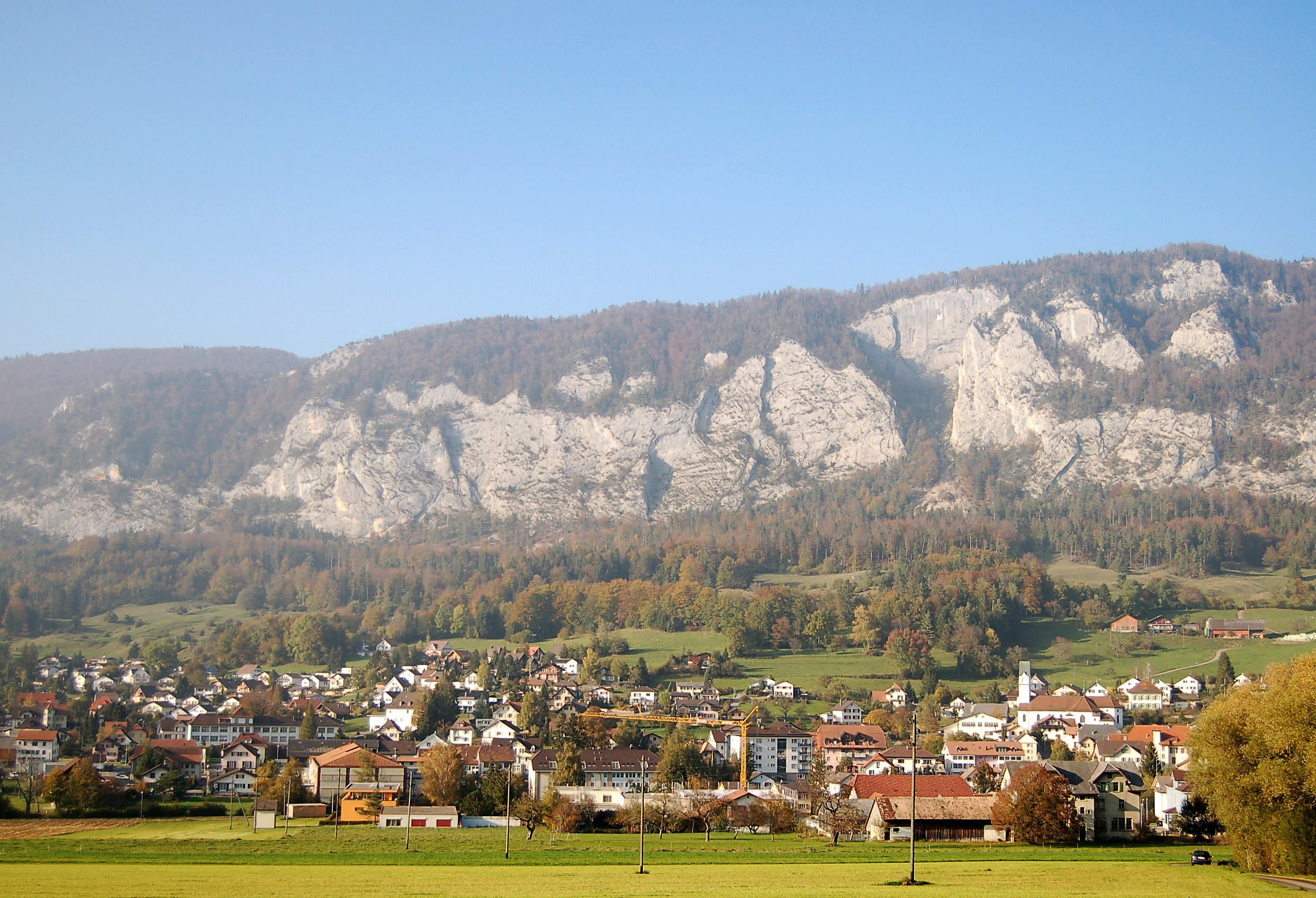 Welschenrohr im Naturpark Thal